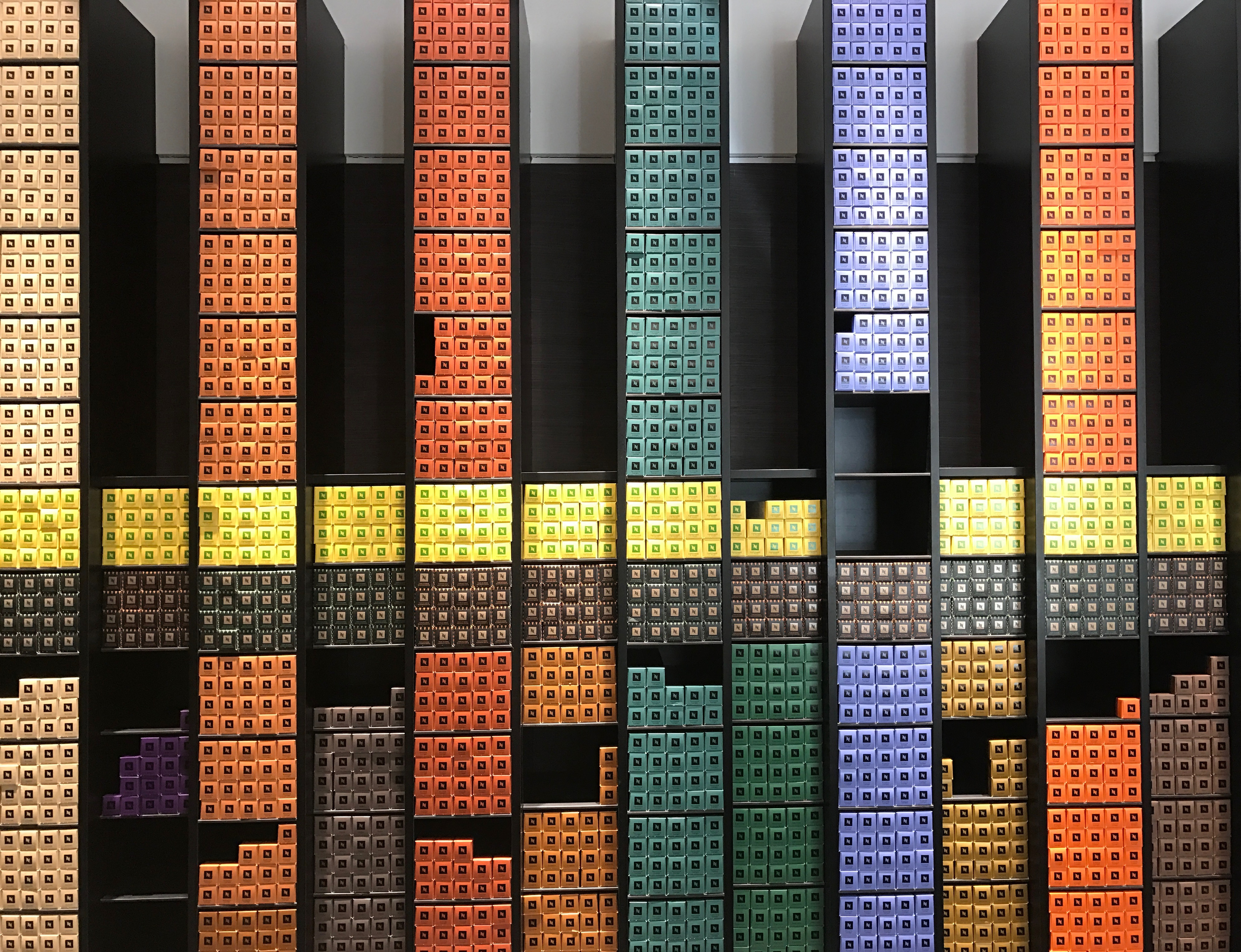 Nespresso Kapseln